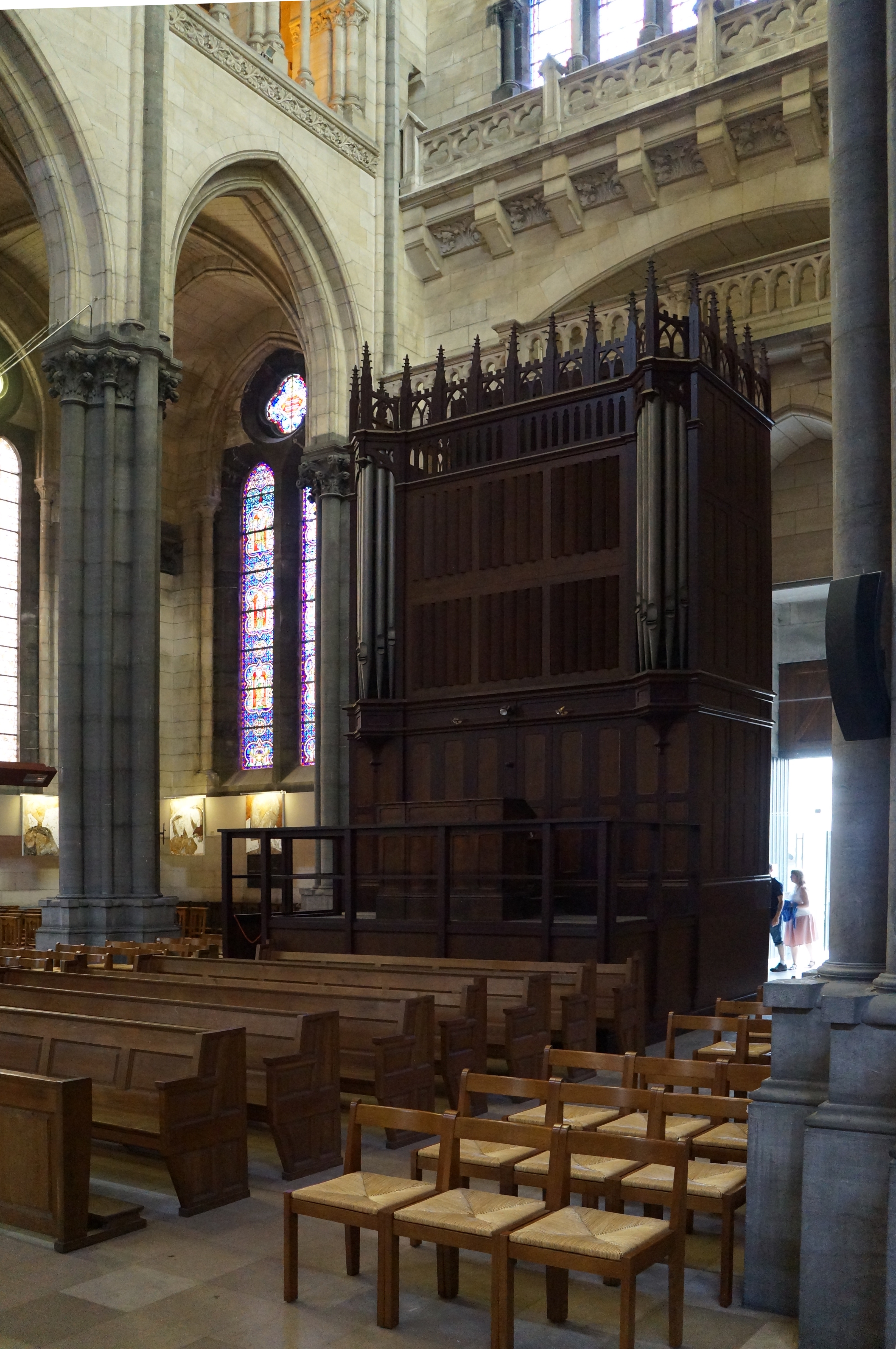 Le petit orgue de seize jeux situé dans le bras nord du transept de la cathédrale Notre-Dame-de-la-Treille Lille Nord (département français) .